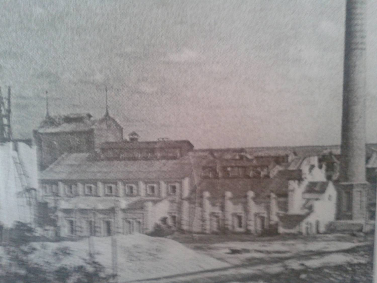 Новопокровский сахарный завод